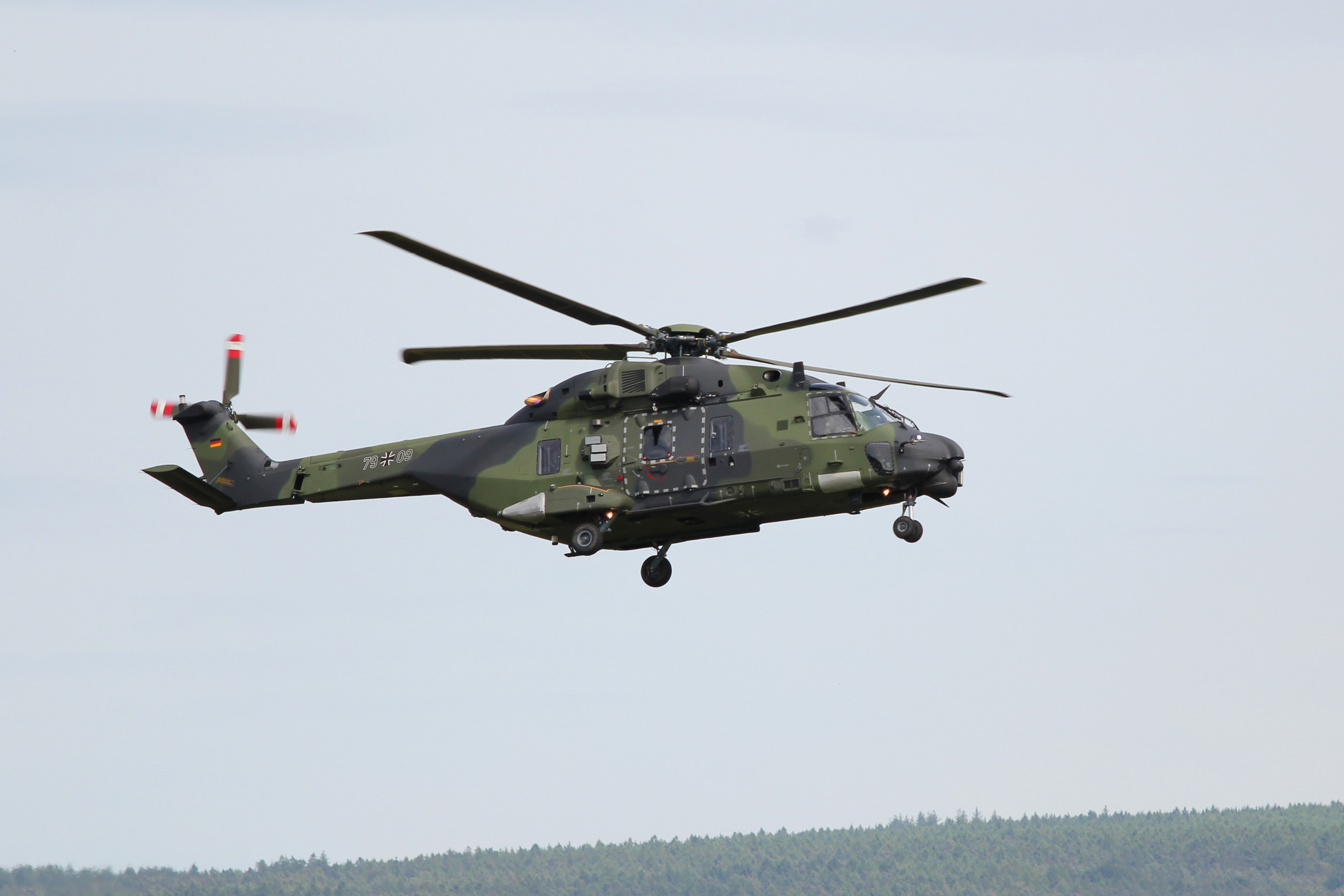 Aufgenommen am Tag der Bundeswehr 2016 beim internationalen Hubschrauberausbildungszentrum auf dem Heeresflugplatz Bückeburg.